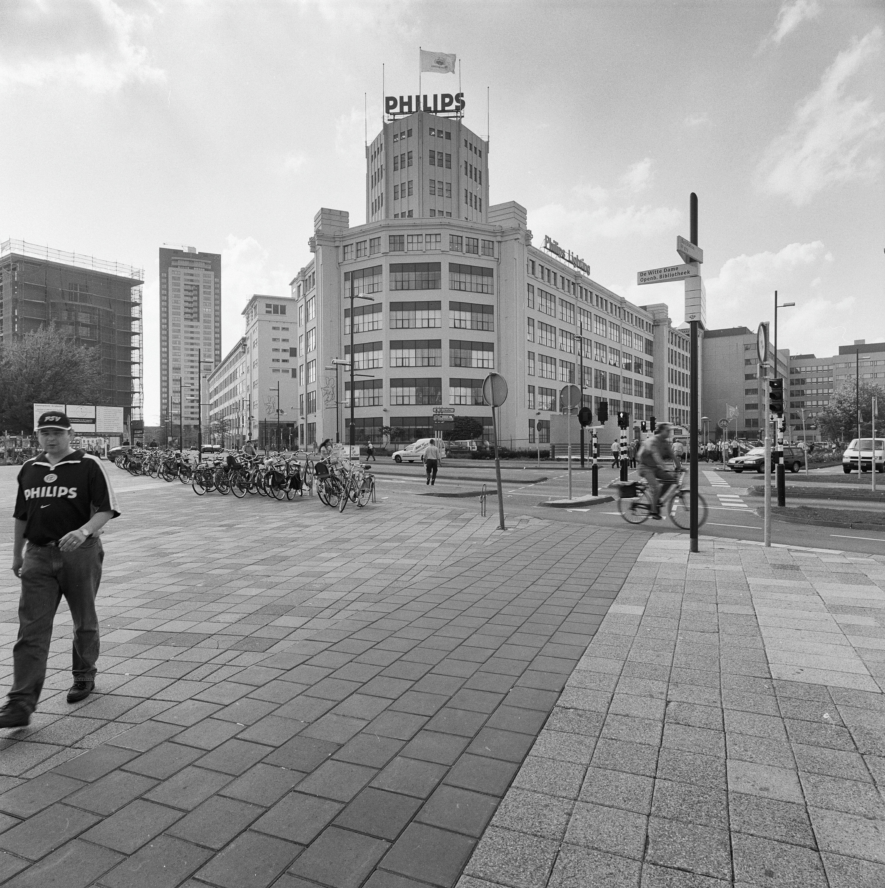 Philips Lichttoren: Aanzicht op de Lichttoren en gebouw ED en EC, met links de Emmasingel en rechts de Mathildelaan